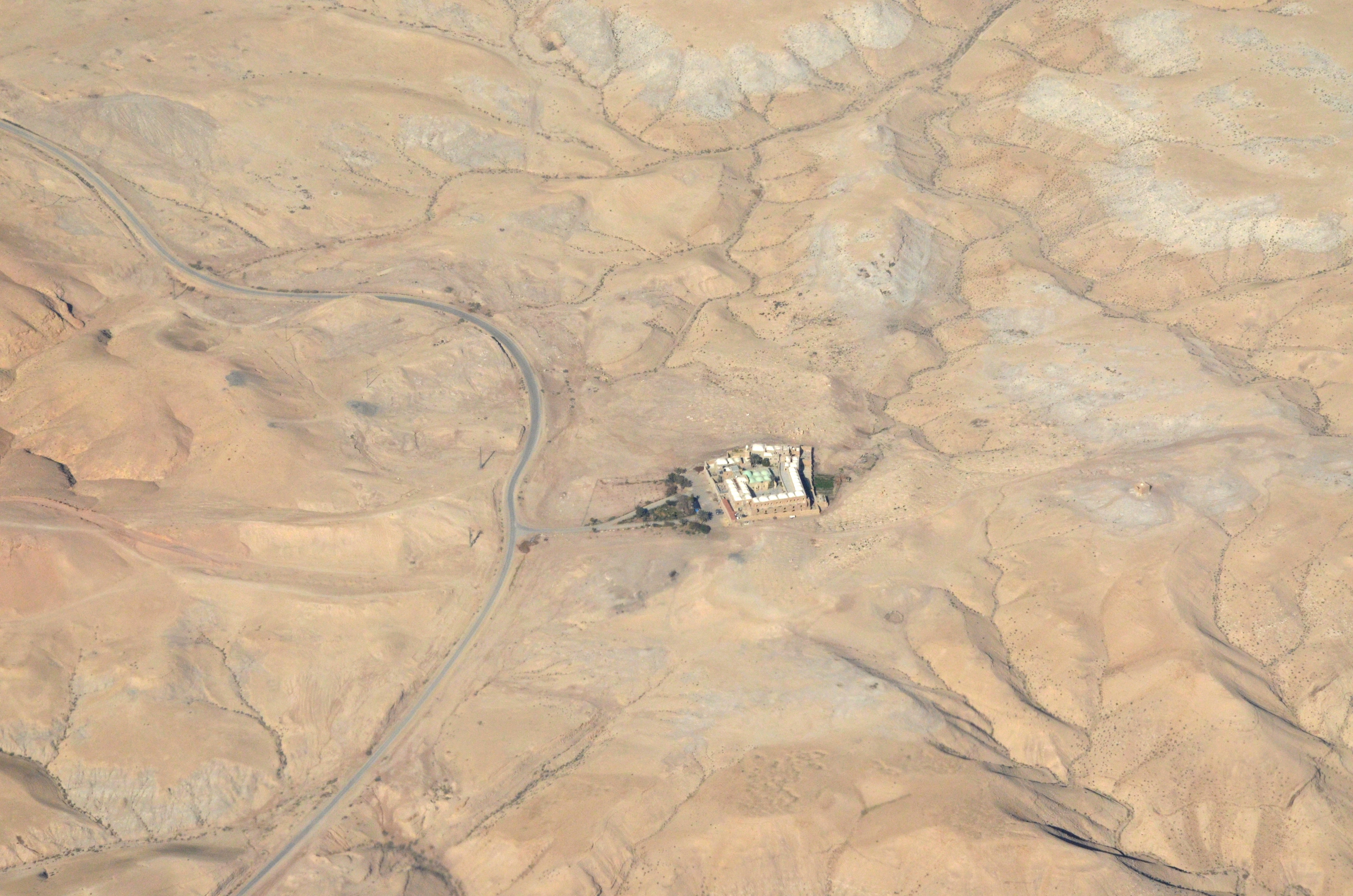 נבי מוסא